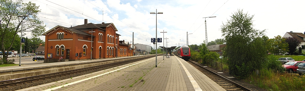 Der Bahnhof Neustadt am Rübenberge, aufgenommen vom nördlichen Ende des Bahnsteigs B in Richtung Wunstorf blickend. Links das Empfangsgebäude, rechts ein RegionalExpress nach Hannover Hbf und Teile der Park&Ride-Anlage.